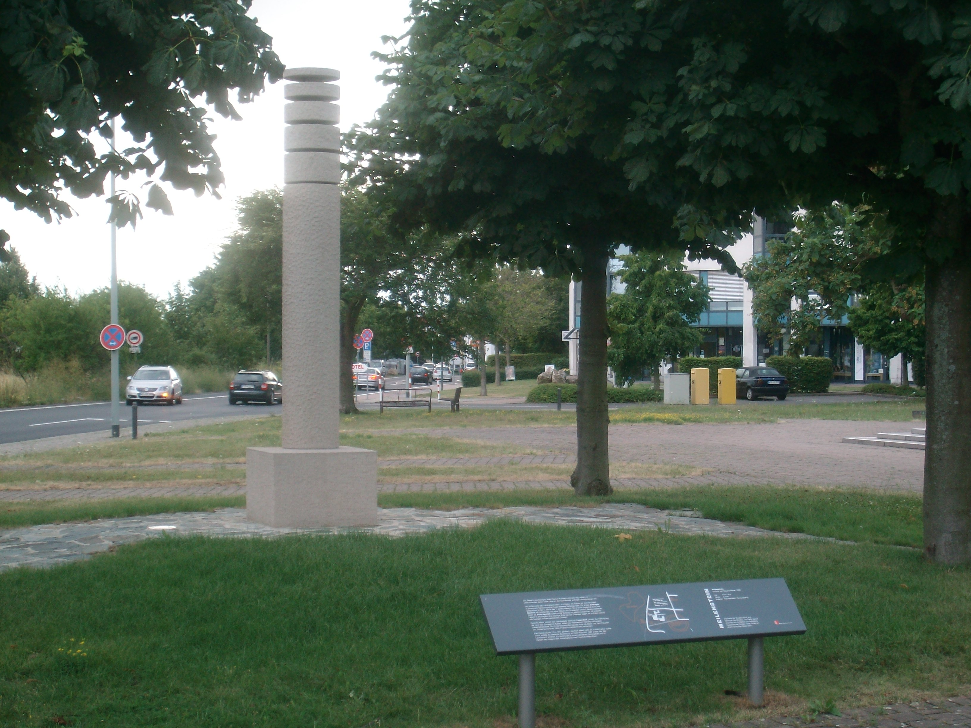 Gedenkstein zu Römerkastellen in Hofheim